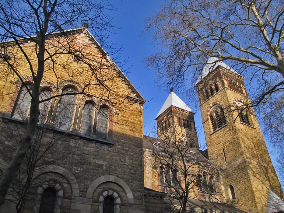 Kirche St. Michael am Brüsseler Platz in Köln